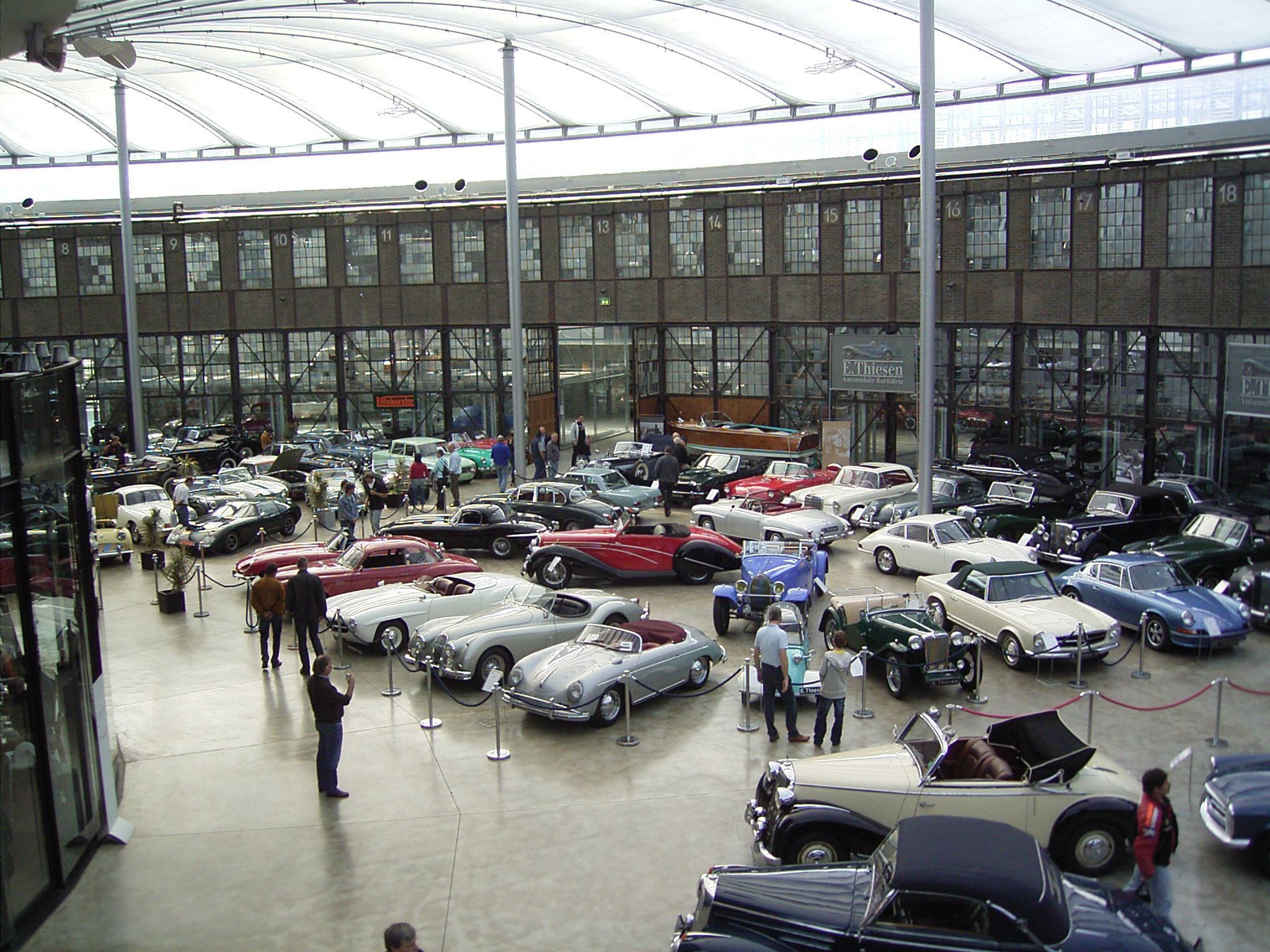 Meilenwerk Düsseldorf Innenraum